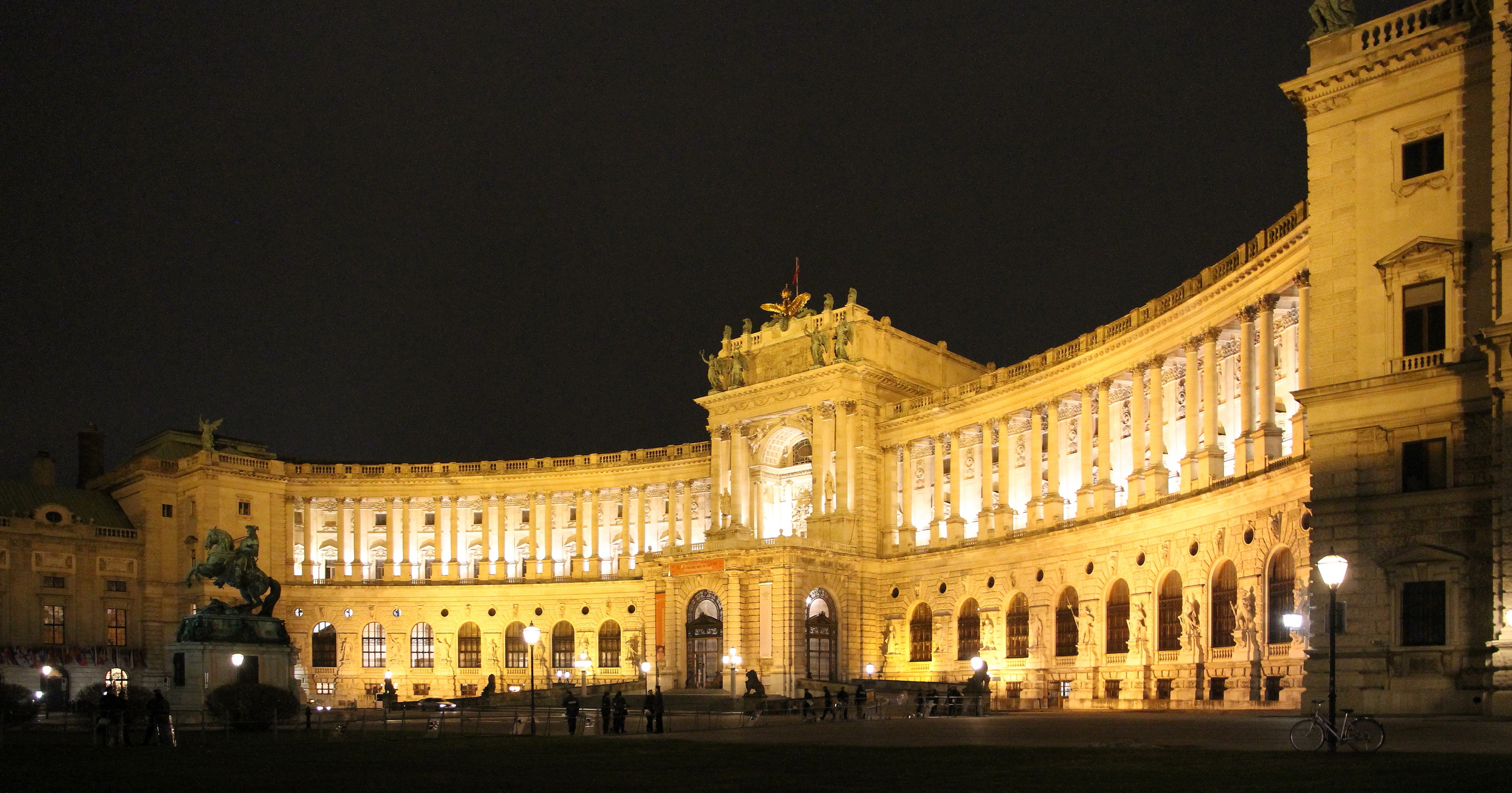 Die Neue Hofburg mit Festbeleuchtung in Wien.